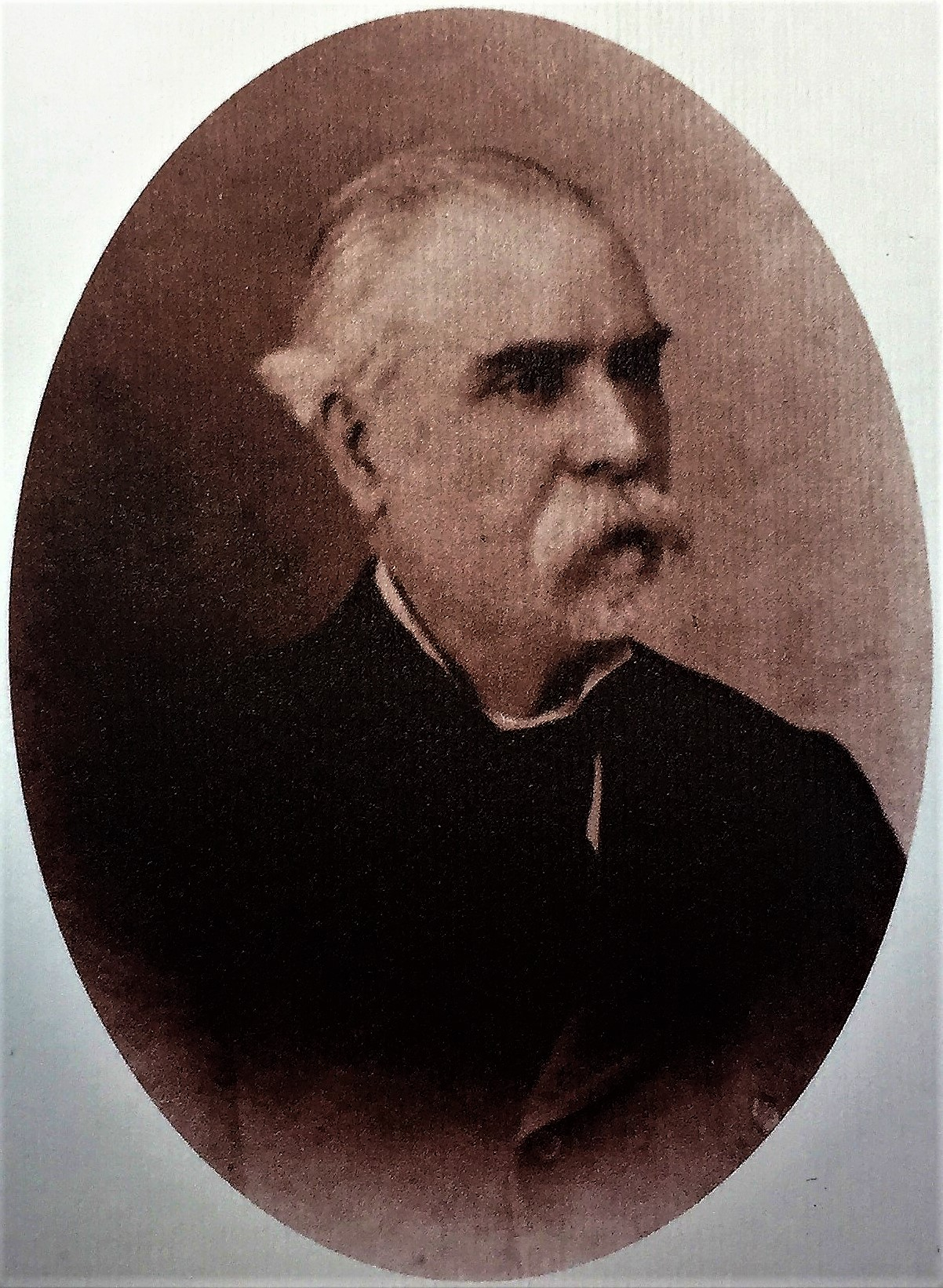 Ritratto di Giuseppe Ria, medico italiano di fine Ottocento